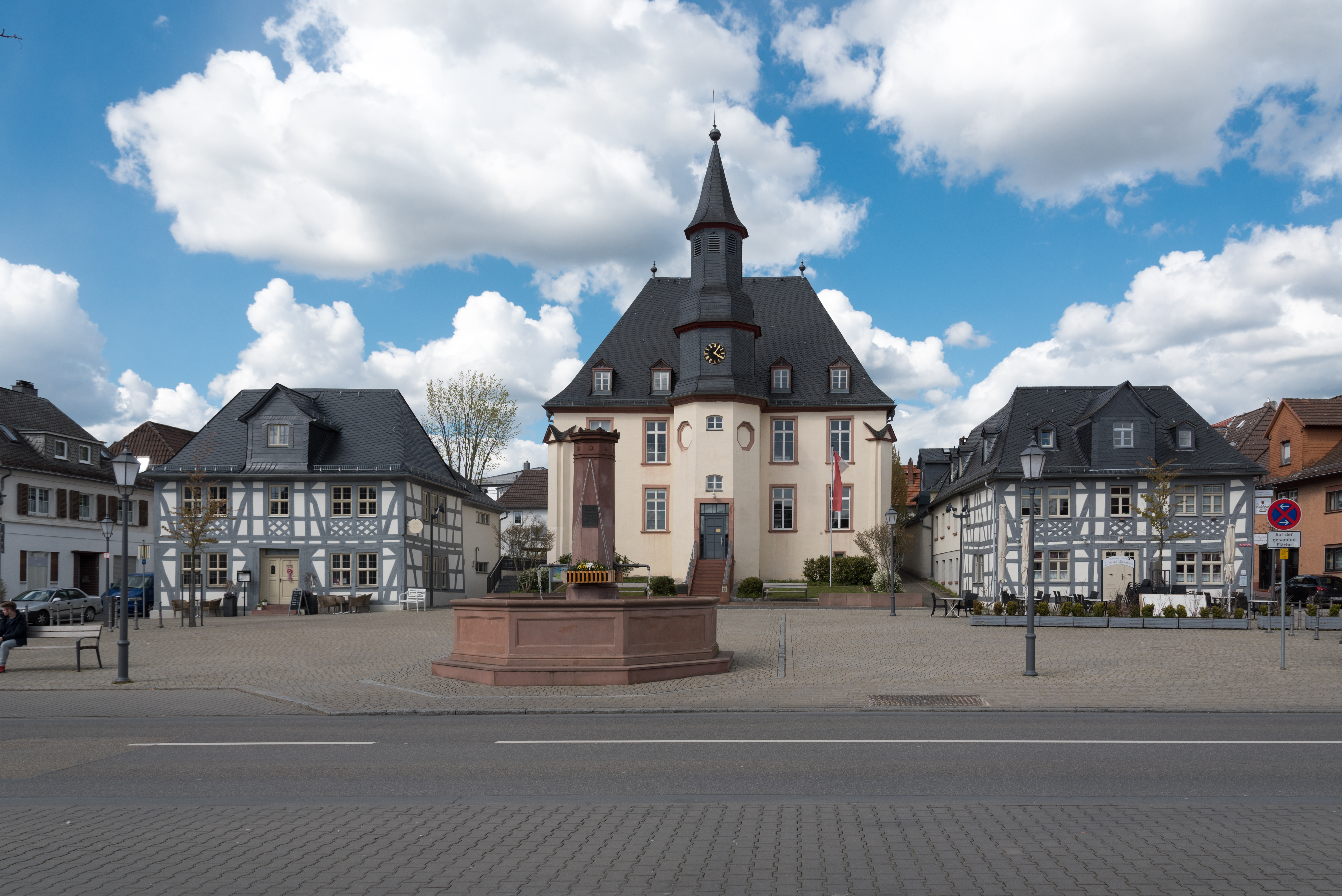 Usingen, Marktplatz 21, 23, 25